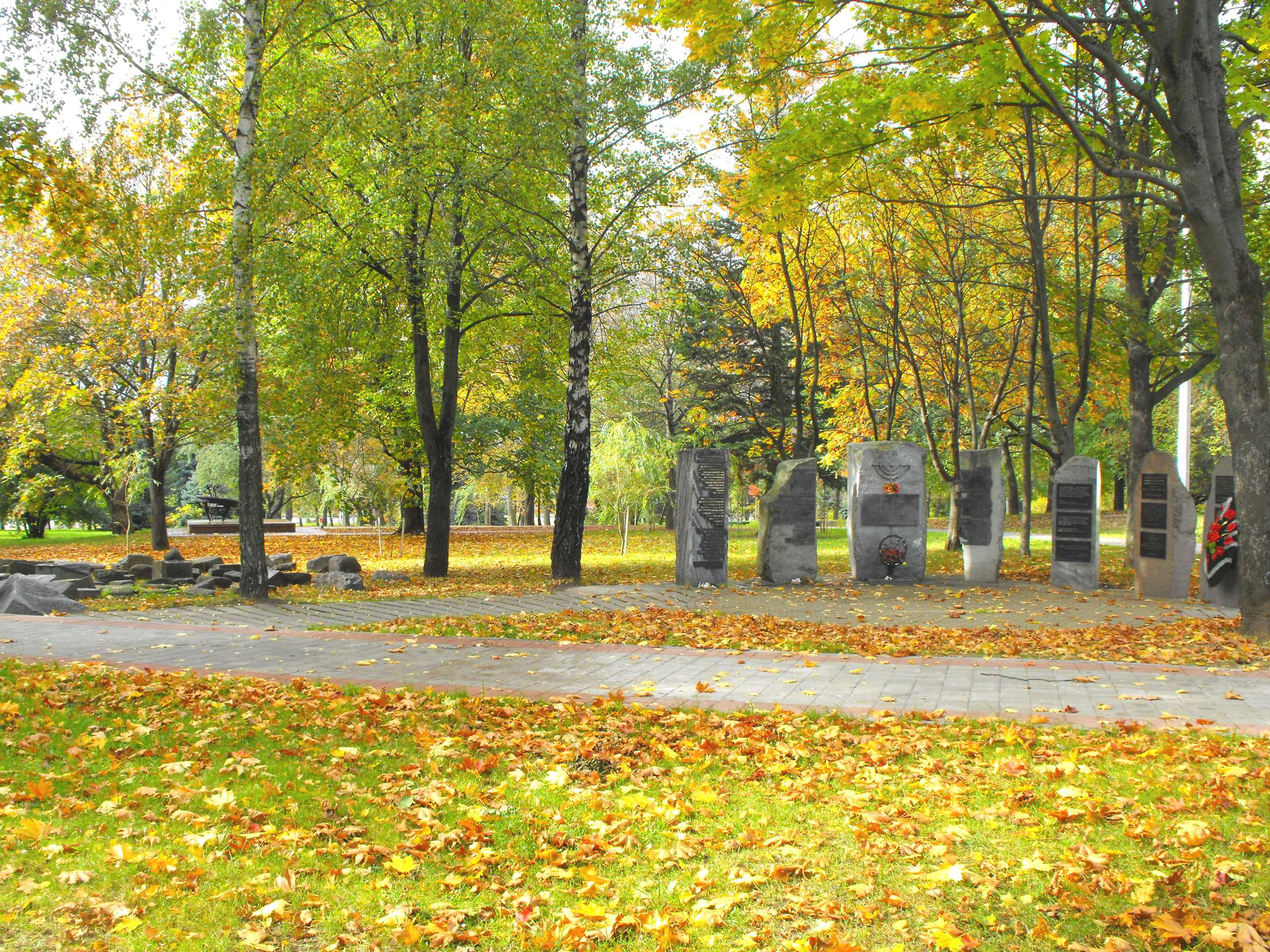 Памятники евреям из Западной Европы -узникам Минского гетто, убитых нацистами. Находятся на территории бывшего еврейского кладбища у перекрестка улиц Сухая и Коллекторная.